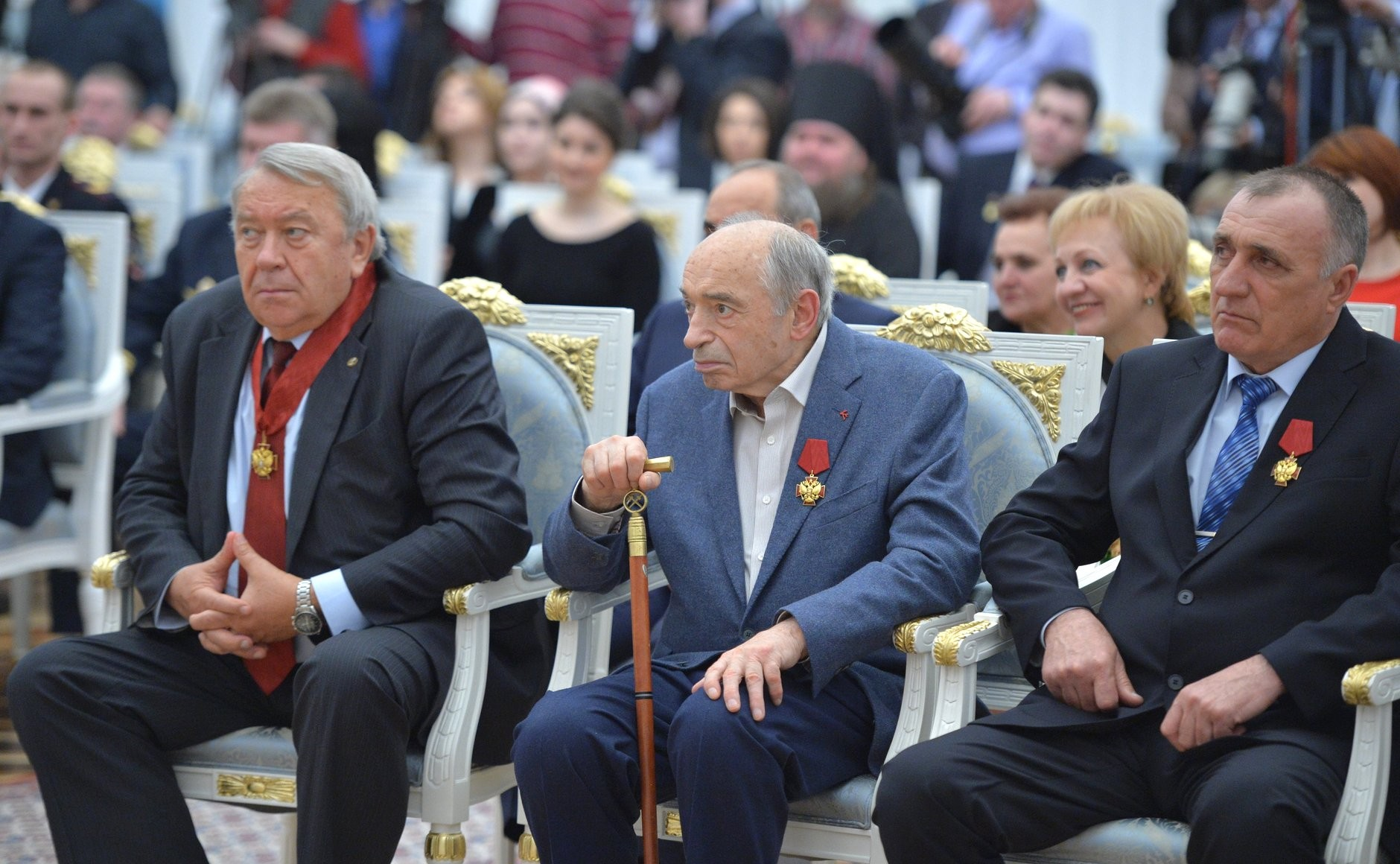 Церемония вручения государственных наград Российской Федерации